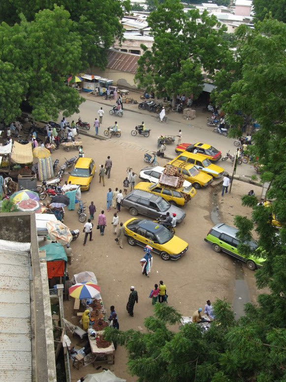 Scènes de rue, Maroua, Cameroun